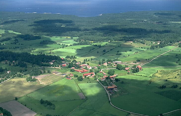 Motiv: Senneby Nyckelord: Flygbilder, Riksintressen Kategori: JordbruksbySenneby